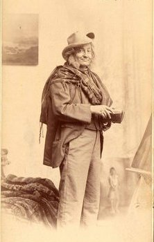 Hauptmann, Gerhart: Crampton mester. Nemzeti Színház. Bemutató: 1897-10-08. Löffler: Gabányi Árpád.